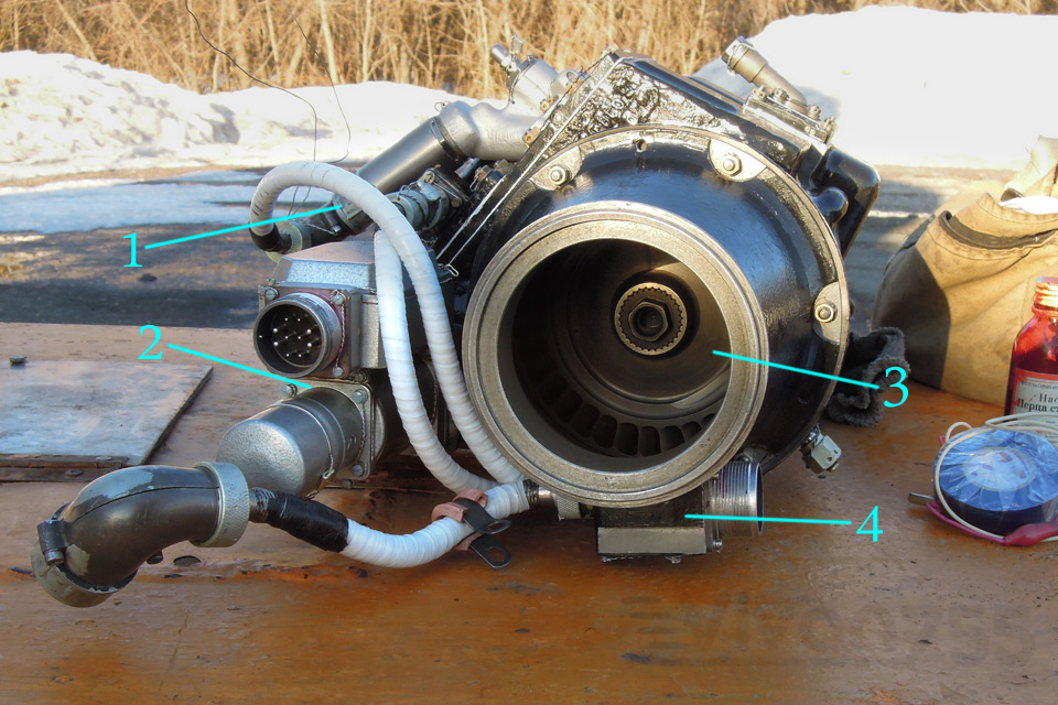 Воздушный стартёр 82.902.000 авиадвигателя НК-8-2У. 1 — электромагнит регулирующей заслонки, 2 — электромеханизм пусковой заслонки, 3 — турбина, 4 — переходная колодка